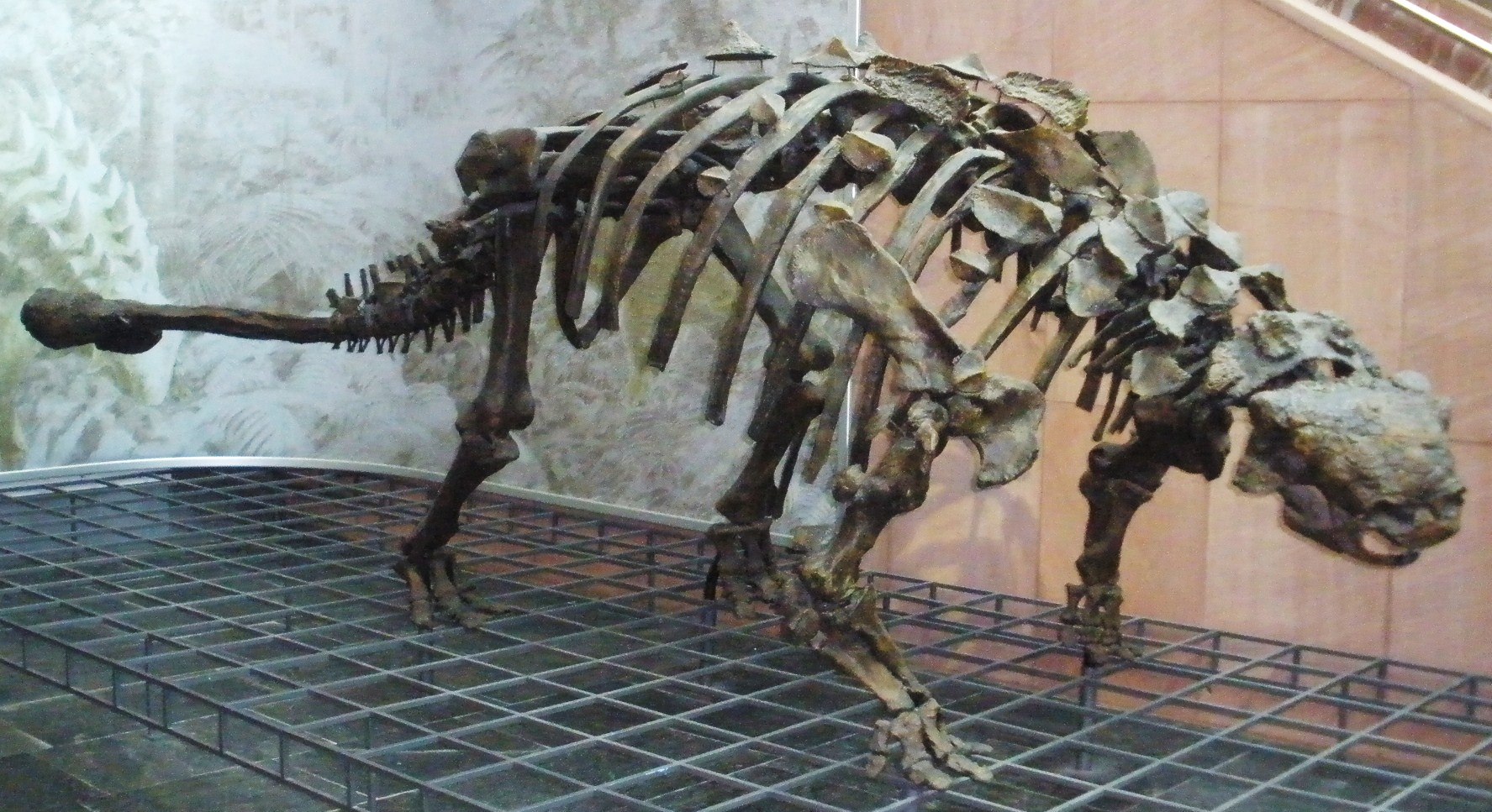 Reconstructed Scolosaurus thronus skeleton (based on holotype ROM 1930, formerly assigned to Euoplocephalus), an extinct ankylosaur- Took the photo at Senckenberg Museum of Frankfurt